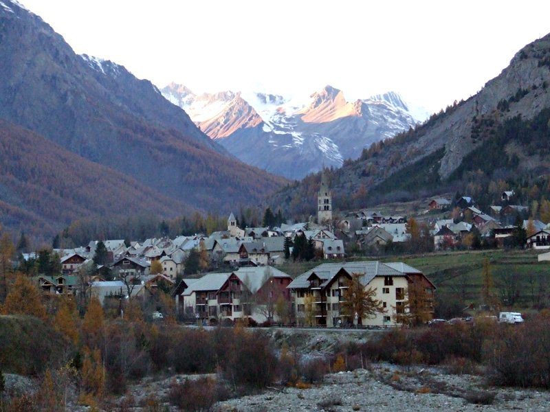 Le Monêtier-les-Bains(commune des Hautes-Alpes faisant partie de la station de Serre Chevalier)